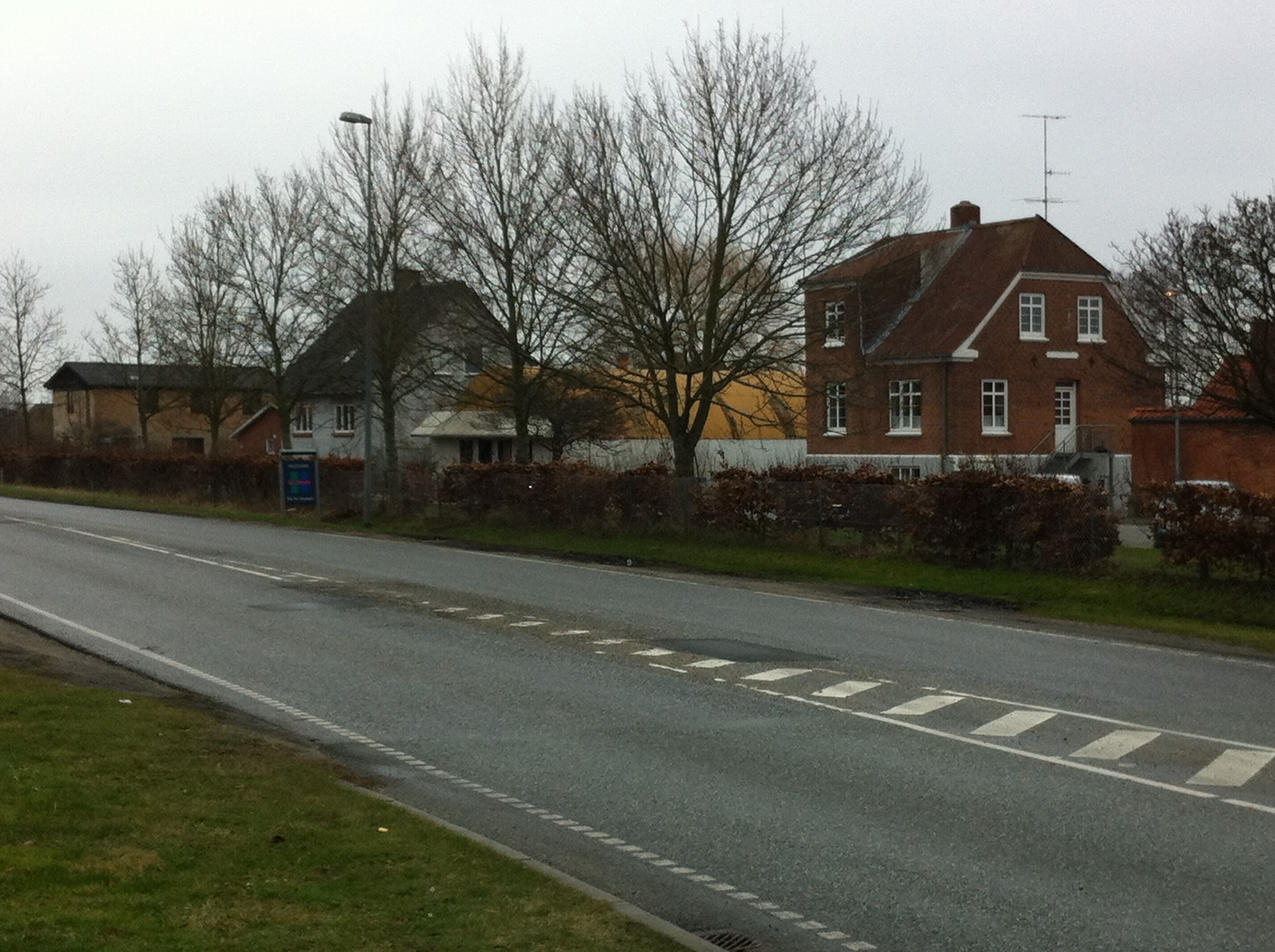 Et gadeparti fra Alsvej i Hadsund. Alsvej 9560 Hadsund